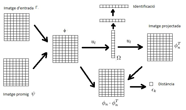 proces